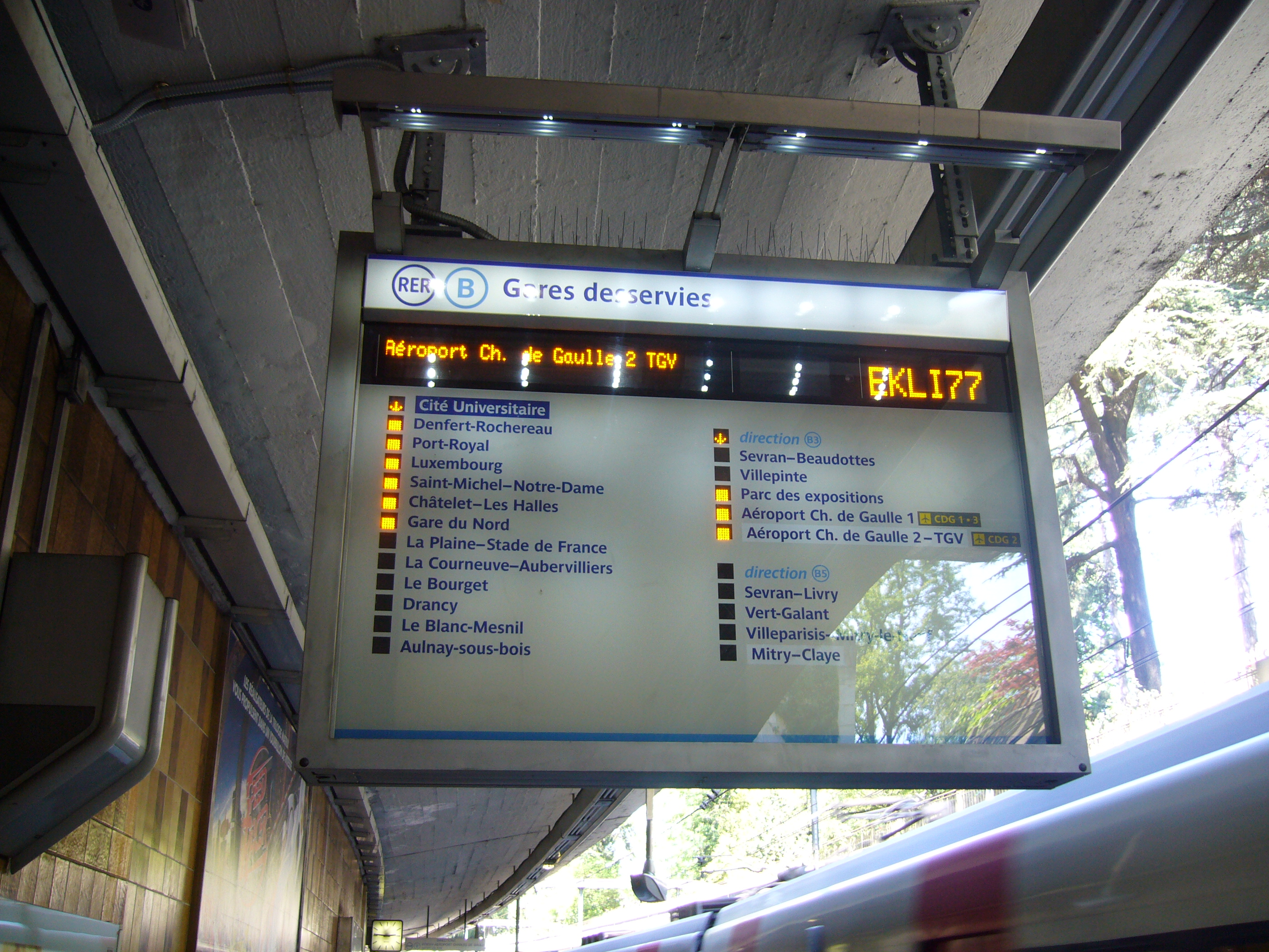 Nouveau panneau indicateur de direction sur les quais du RER B à Cité Universitaire